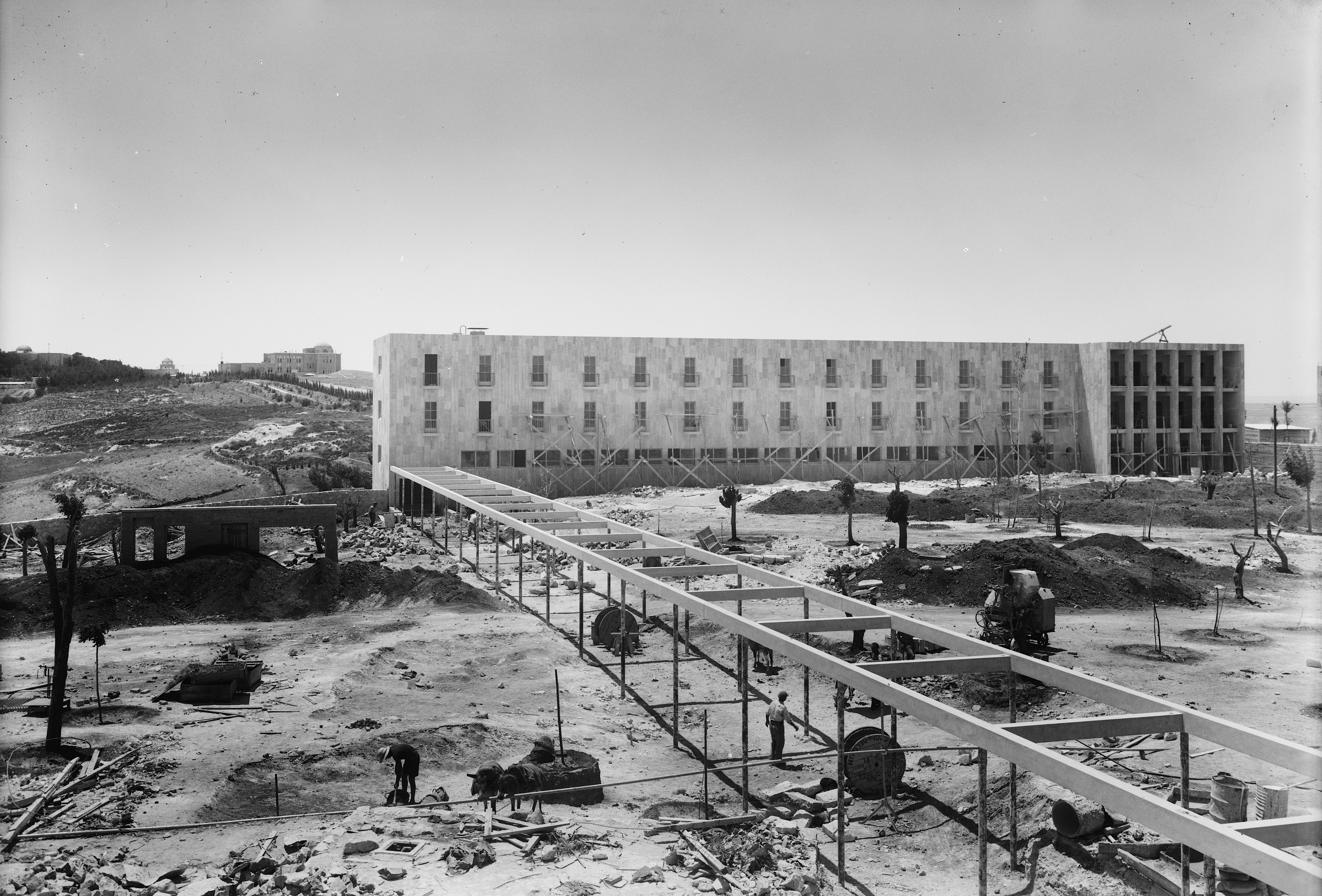 הדסה הר הצופים, מבנה הכניסה, Original information: TITLE: Hadassah University on Scopus. The Hadassah School of Nursing & pergola. CALL NUMBER: LC-M32- 9707[P&P] REPRODUCTION NUMBER: LC-DIG-matpc-04032 (digital file from original photo) RIGHTS INFORMATION: No known restrictions on publication. MEDIUM: 1 negative : glass, dry plate ; 5 x 7 in. CREATED/PUBLISHED: [between 1934 and 1939] CREATOR: Matson Photo Service, photographer. NOTES: Title and date from: photographer's logbook: Matson Registers, v. 1, [1934-1939]. Gift; Episcopal Home; 1978. SUBJECTS: Jerusalem. FORMAT: Dry plate negatives. PART OF: G. Eric and Edith Matson Photograph Collection REPOSITORY: Library of Congress Prints and Photographs Division Washington, D.C. 20540 USA DIGITAL ID: (digital file from original photo) matpc 04032 CONTROL #: mpc2004002949/PP